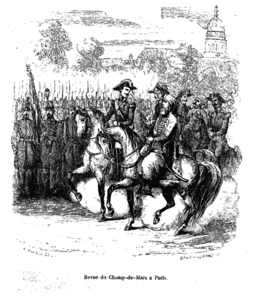 Ibrahim Pachá en un desfile militar en Campo de Marte (París). En segundo plano, a la derecha el coronel Sève.